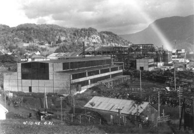 Industrianlegget på Nesøyra i Saudasjøen i Sauda som ble bygget ut av A/S Nordag under andre verdenskrig. I dag er det fabrikken Si-Glass som rår over området. Kun en av de mange opprinnelige bygningene står igjen, mens nyere industribygninger idag dominerer området.